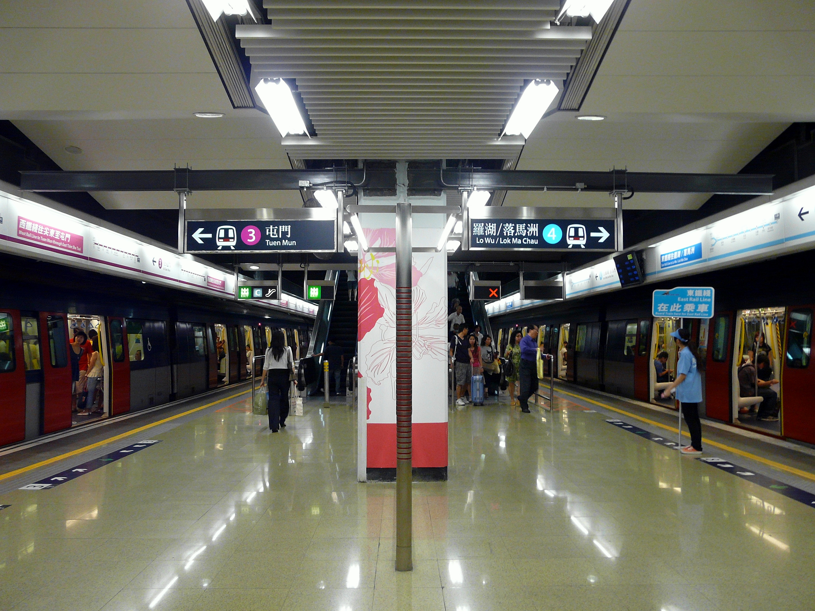 紅磡站3、4號月台